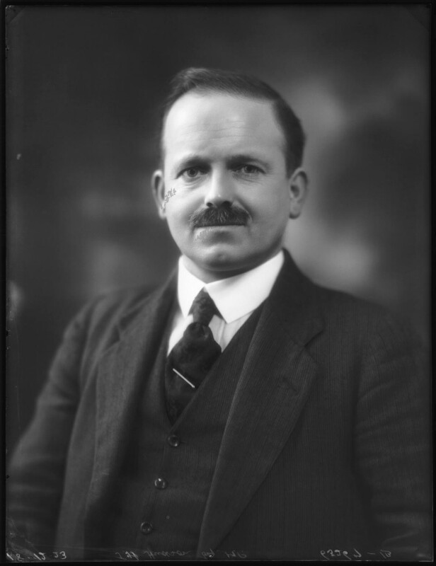 James Hindle Hudson